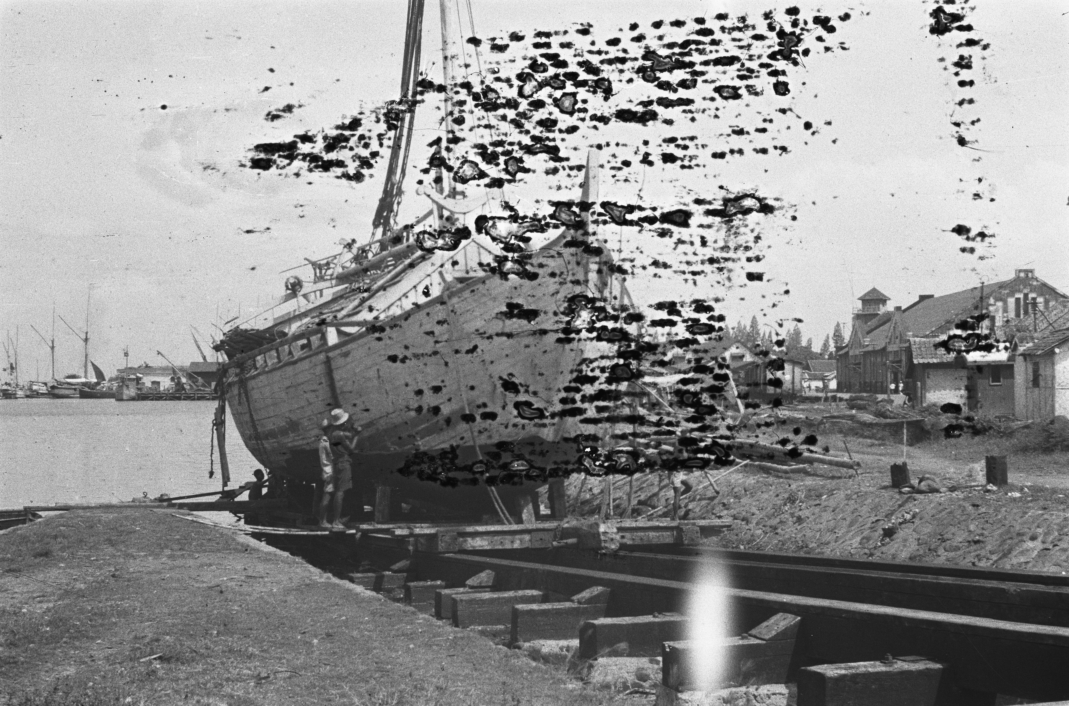 Collectie / Archief : Fotocollectie Dienst voor Legercontacten Indonesië Reportage / Serie : [DLC] Cheribon. Parade, diverse onderwerpen [Tjikampek] Beschrijving : Scheepswerf. Een zeilschip op de scheepshelling Datum : oktober 1947 Locatie : Indonesië, Nederlands-Indië Fotograaf : Wakker, H. / DLC Auteursrechthebbende : Nationaal Archief Materiaalsoort : Negatief (zwart/wit) Nummer archiefinventaris : bekijk toegang 2.24.04.03 Bestanddeelnummer : 389-6-4